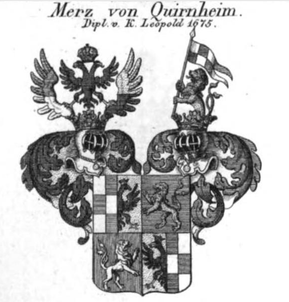 gebessertes Wappen derer v. Merz als 1675 der Reichsadelsstand mit dem erblichen Titel "von Quirnheim" bestätigt wurde